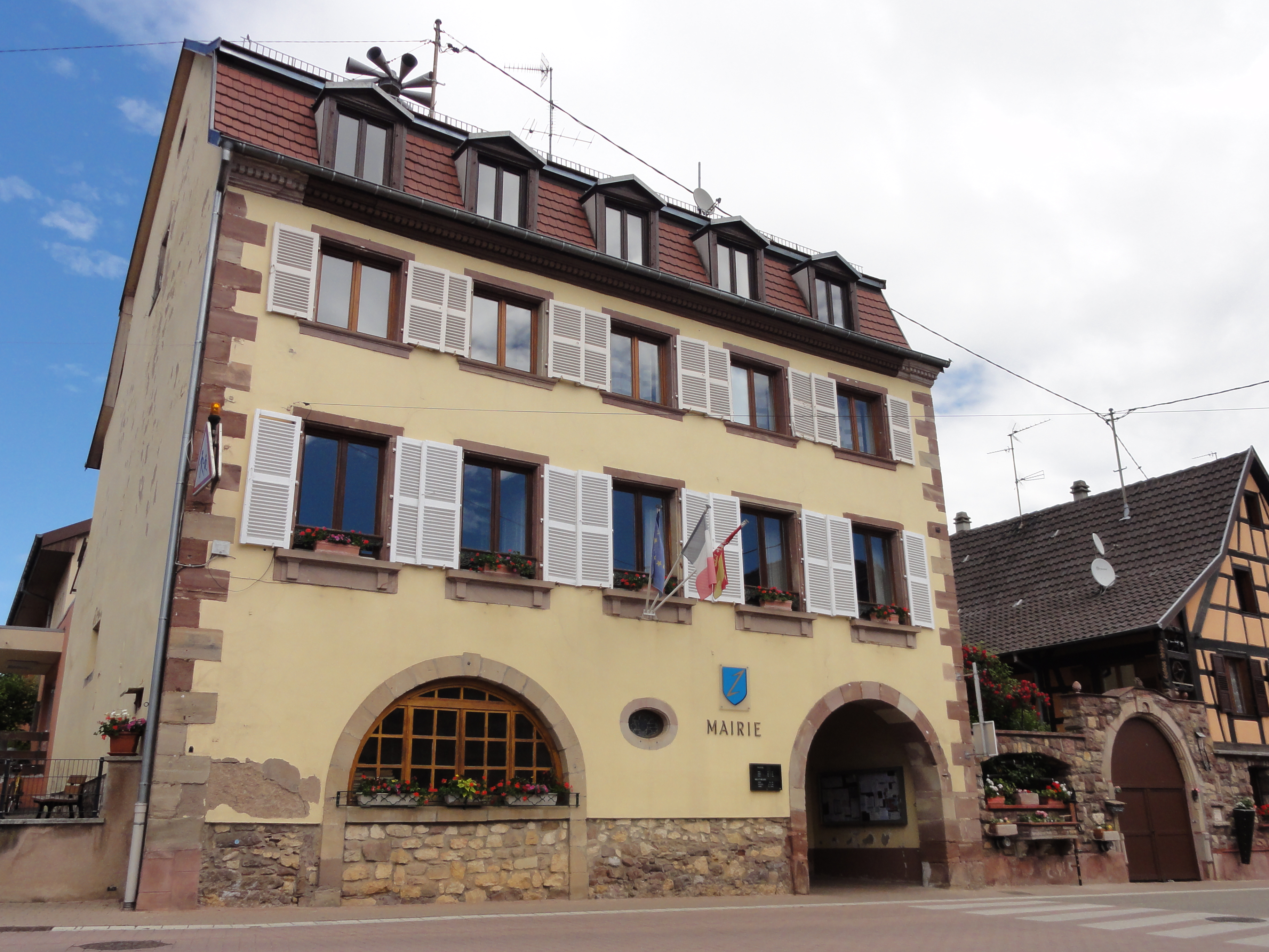 Alsace, Bas-Rhin, Wolxheim, Mairie (XIXe-XXe), 17 rue Principale.